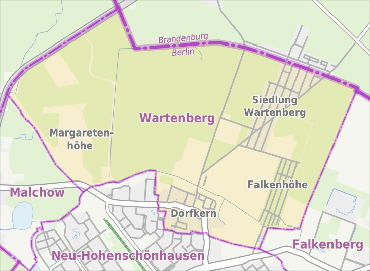 Übersichtskarte der Straßen und Ortslagen in Berlin-Wartenberg